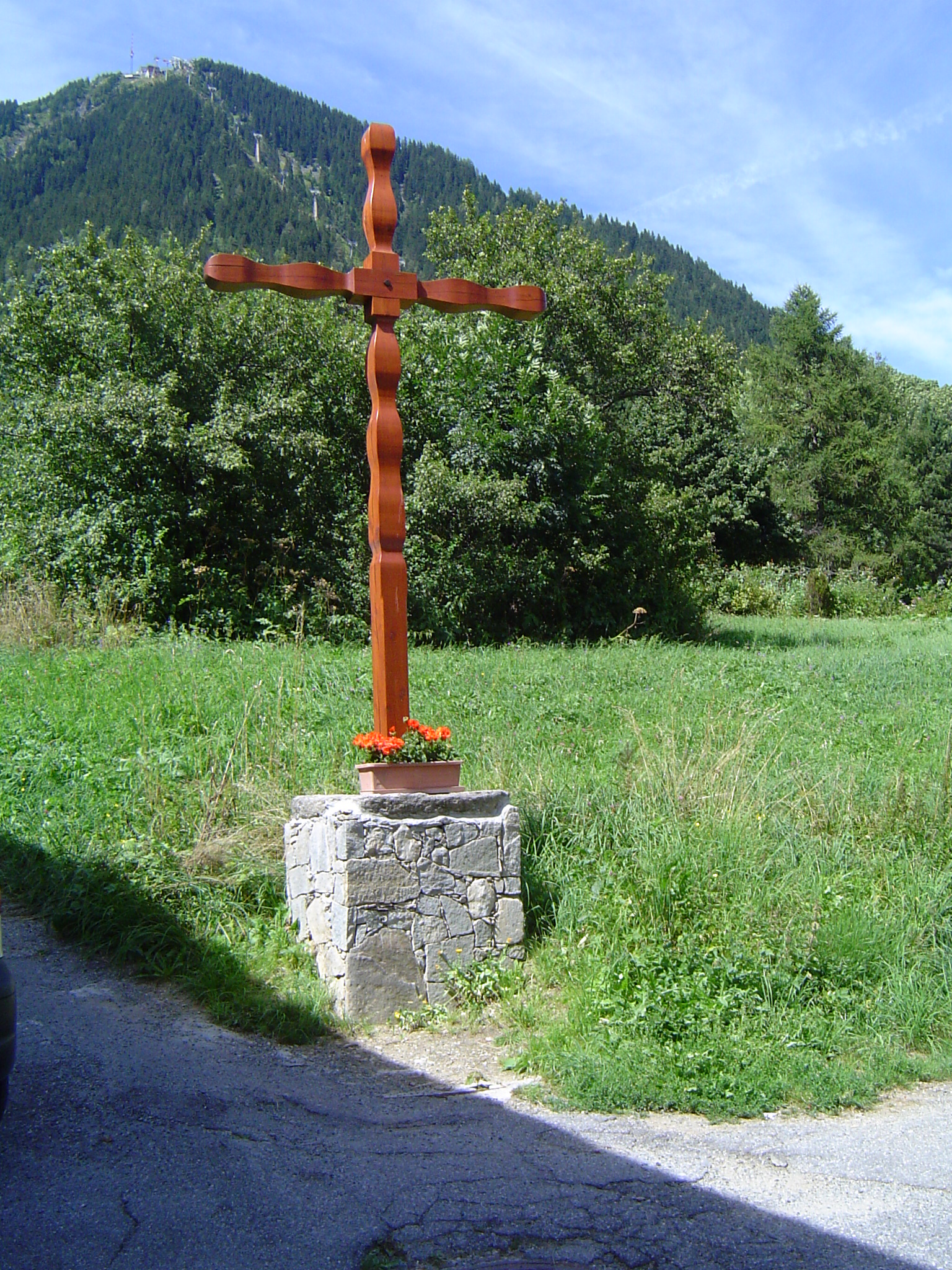 Photos prises dans la commune de Chamonix-Mont-Blanc